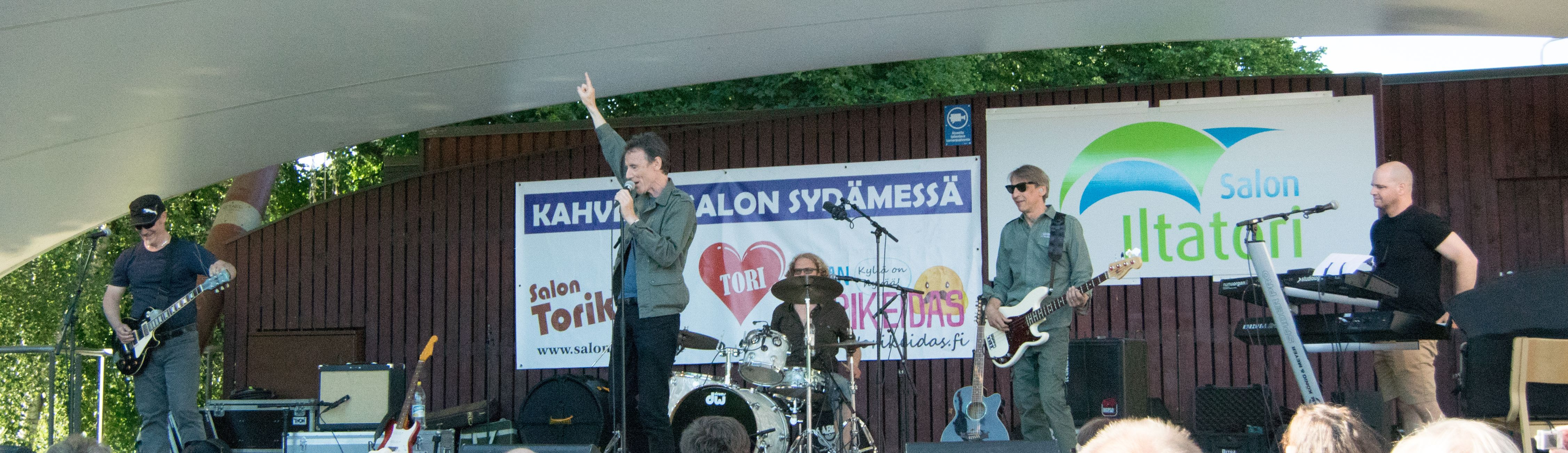 Paul oxley's unit yhtye